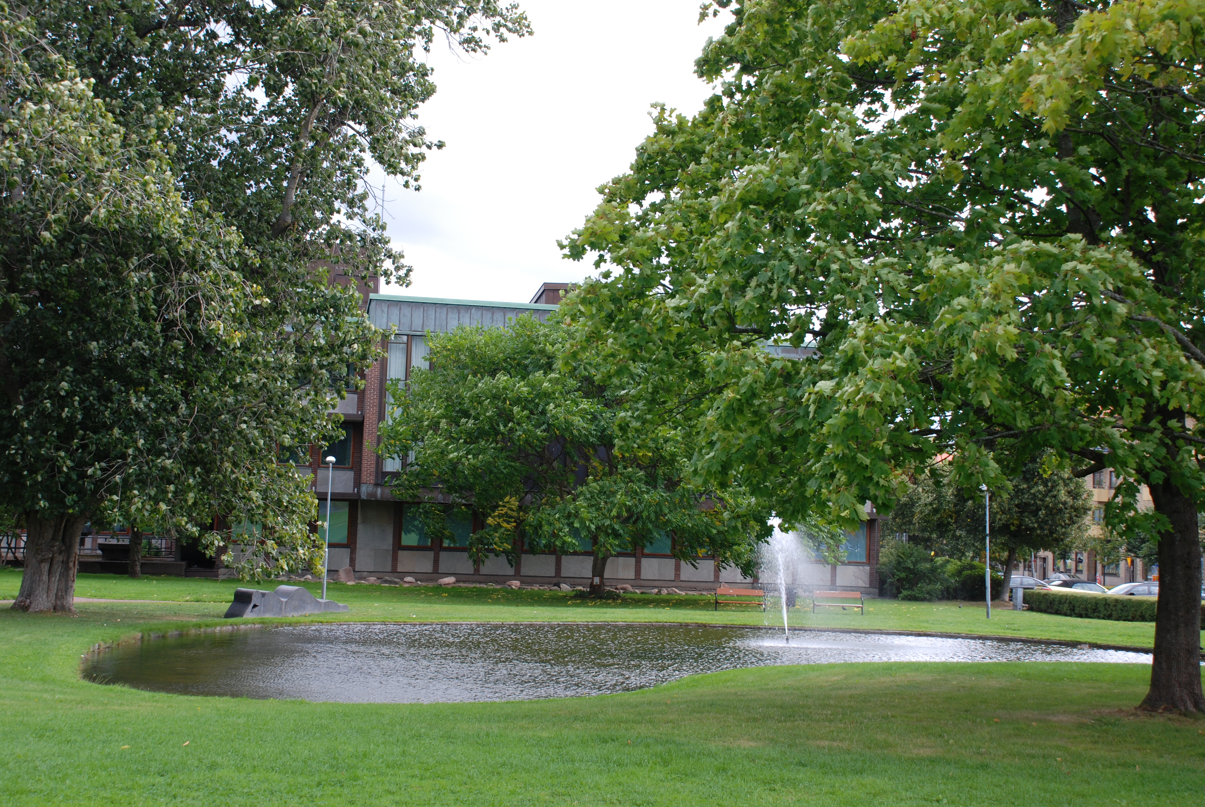 Stadshusparken i Mölndal.